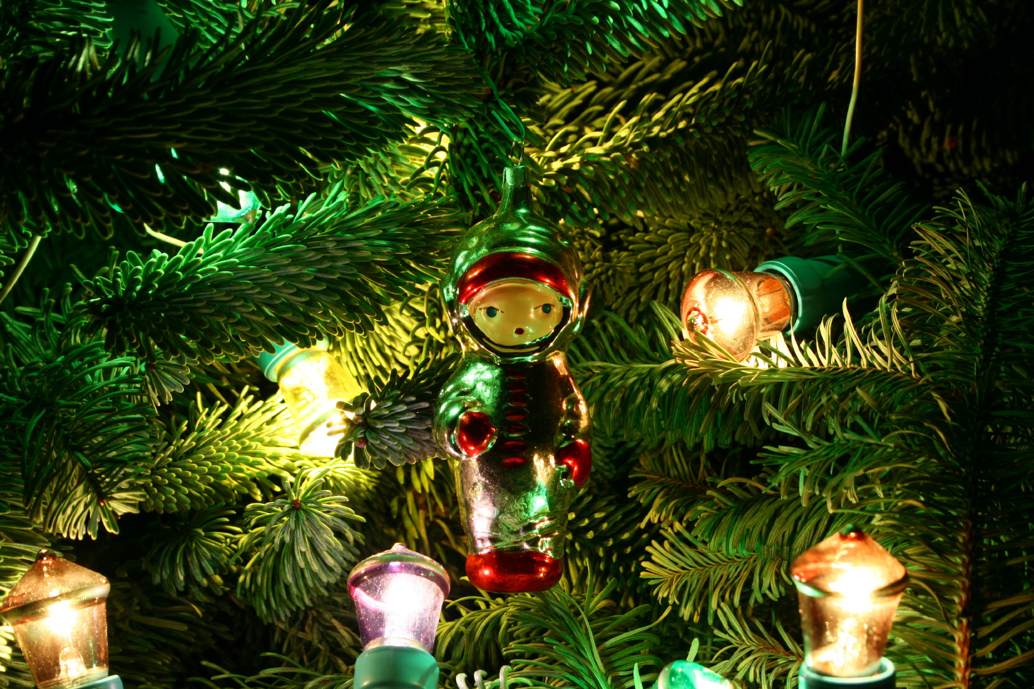 Елочное украшение "Космонавт". СССР, 1960е годы ХХв.